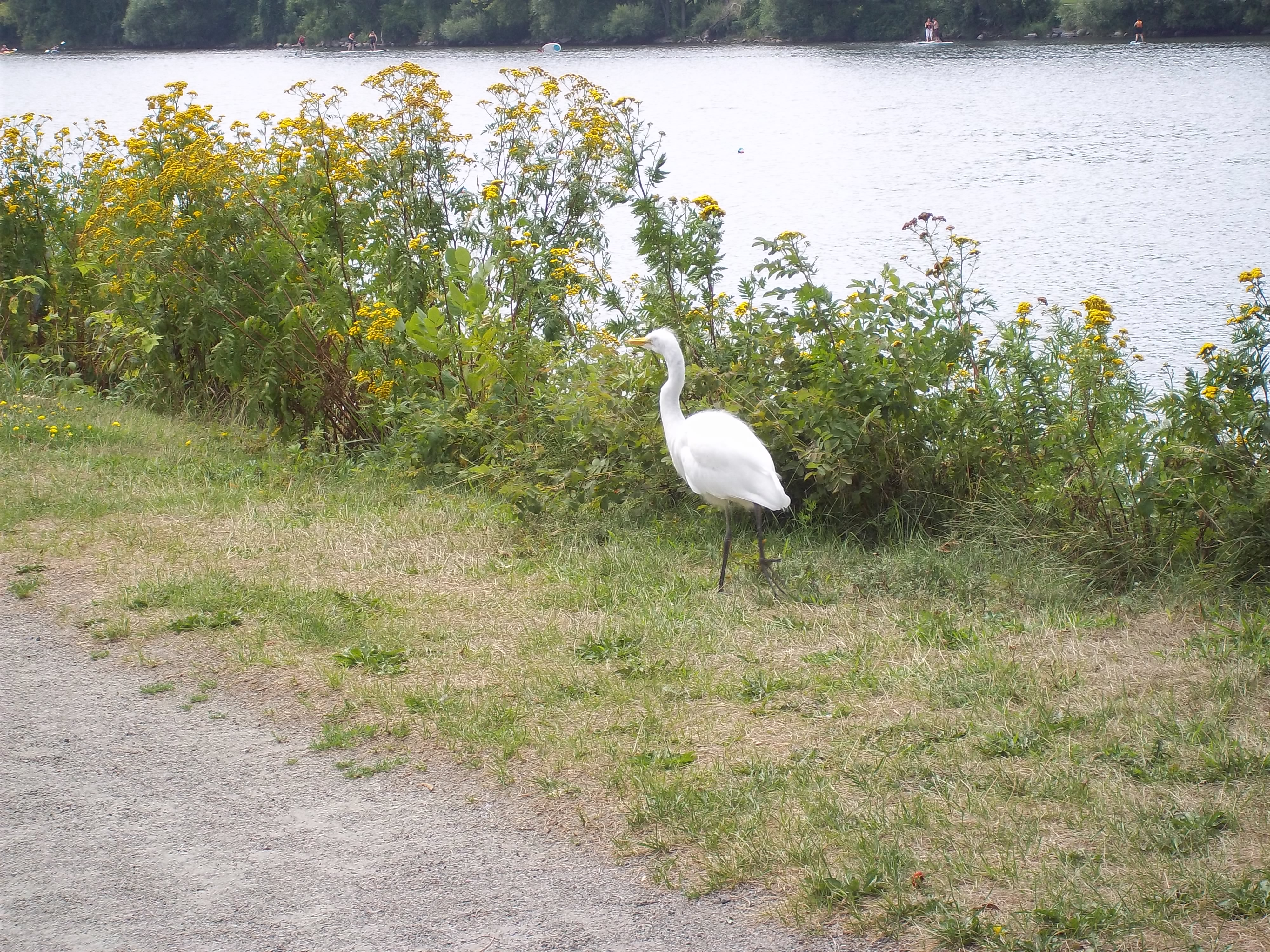 Aigrette d'environ 4 mois, parc des Rapides, Lachine, Montréal